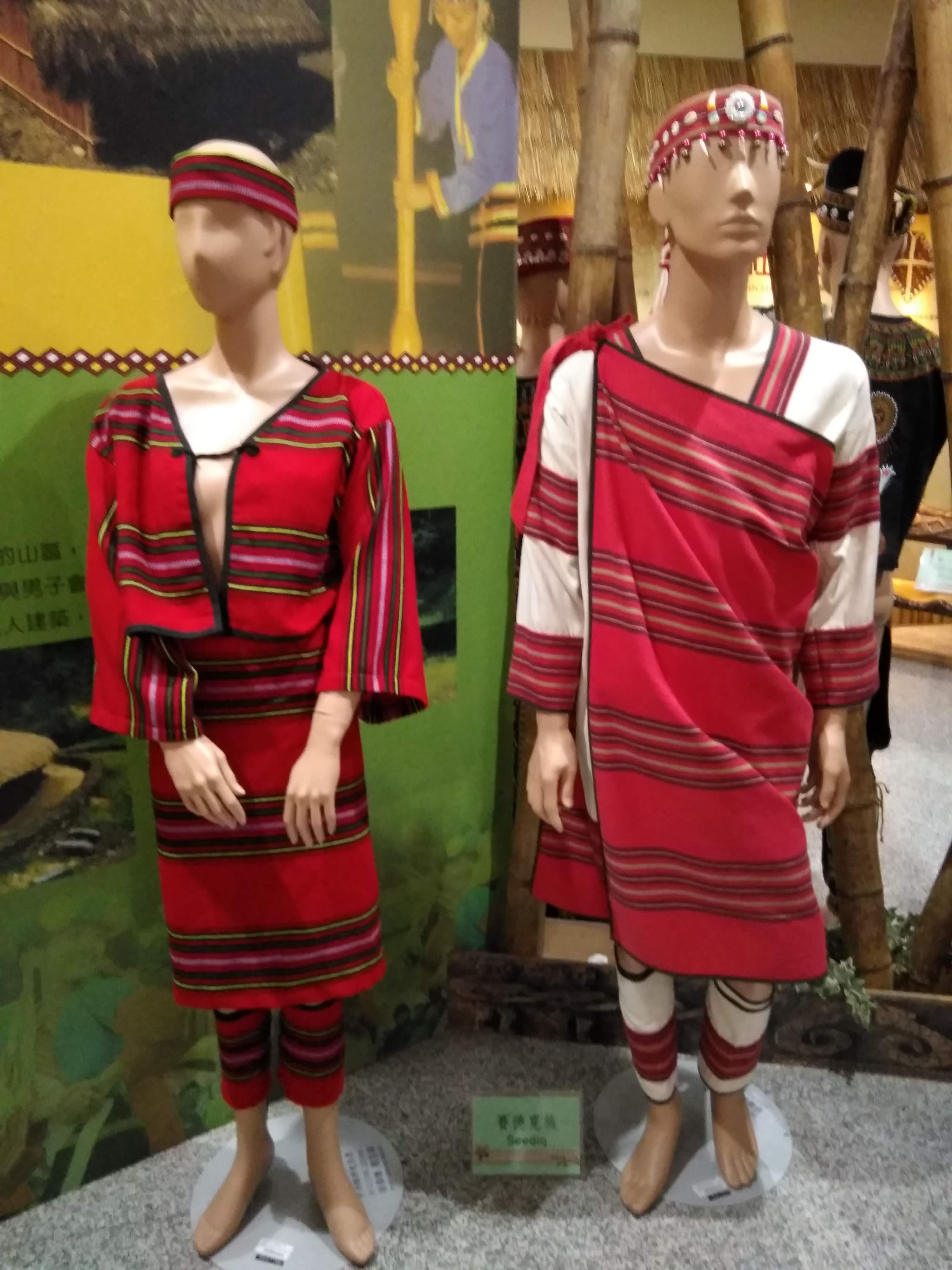 中文（台灣）: 台灣原住民服飾，賽德克族